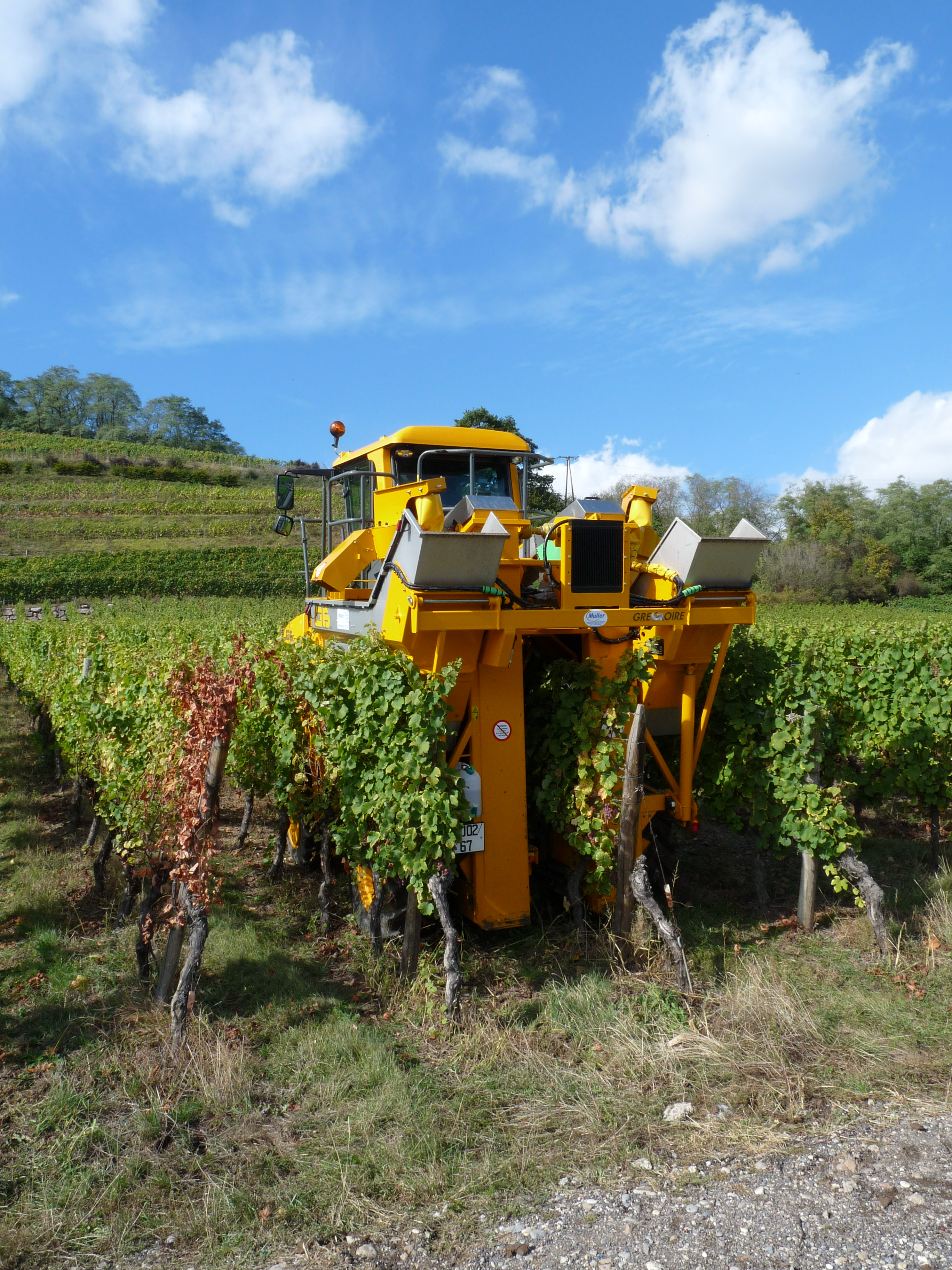 Orschwiller (Bas-Rhin) : machine à vendanger Gregoire (Gewurztraminer)